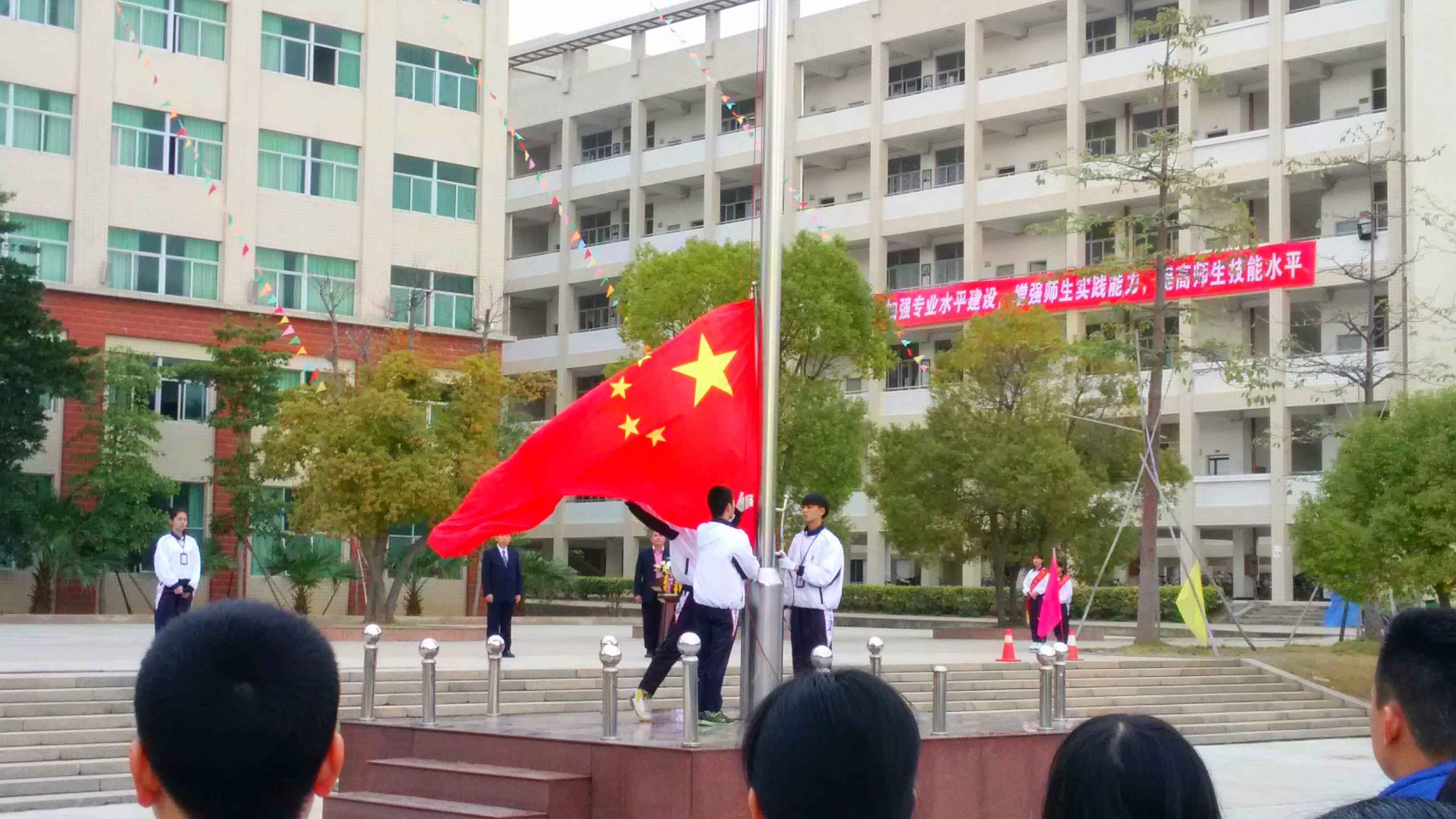 2015年12月7日上午，学校在校园广场举办建校65周年庆典，升旗队升起中华人民共和国国旗。